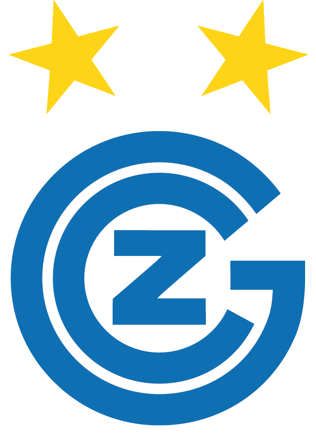 Vereinslogo des Grasshopper Club Zürich